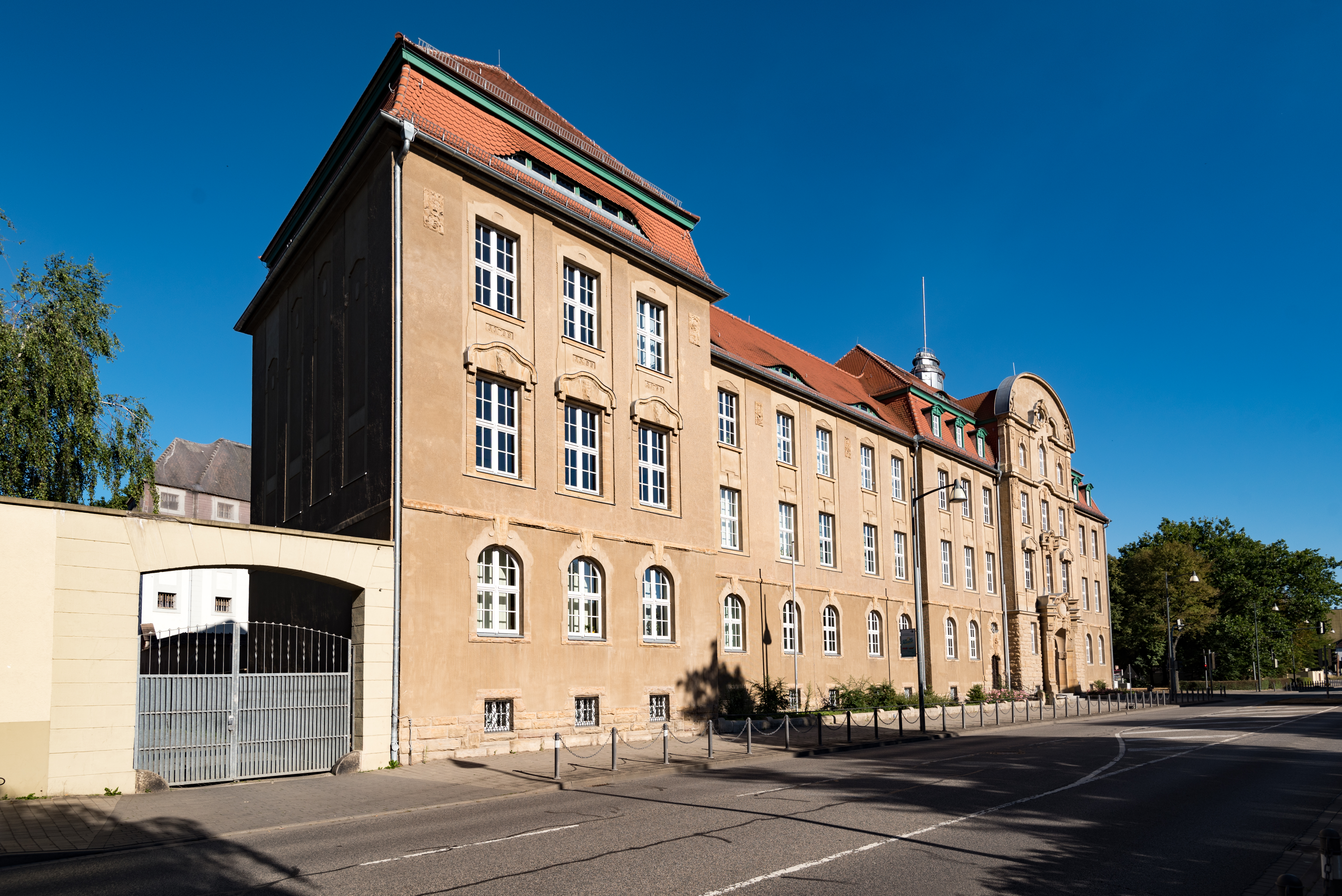 Weißenfels, Friedrichstraße 18